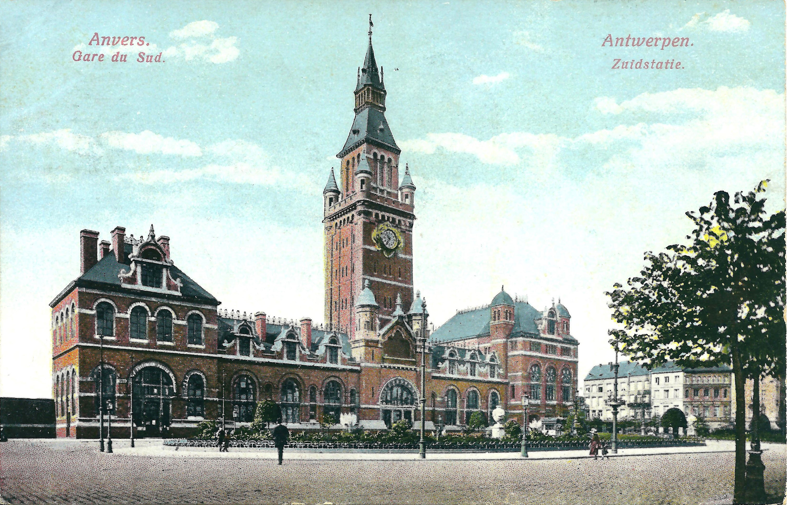 Briefkaart van het vroegere Zuid-station